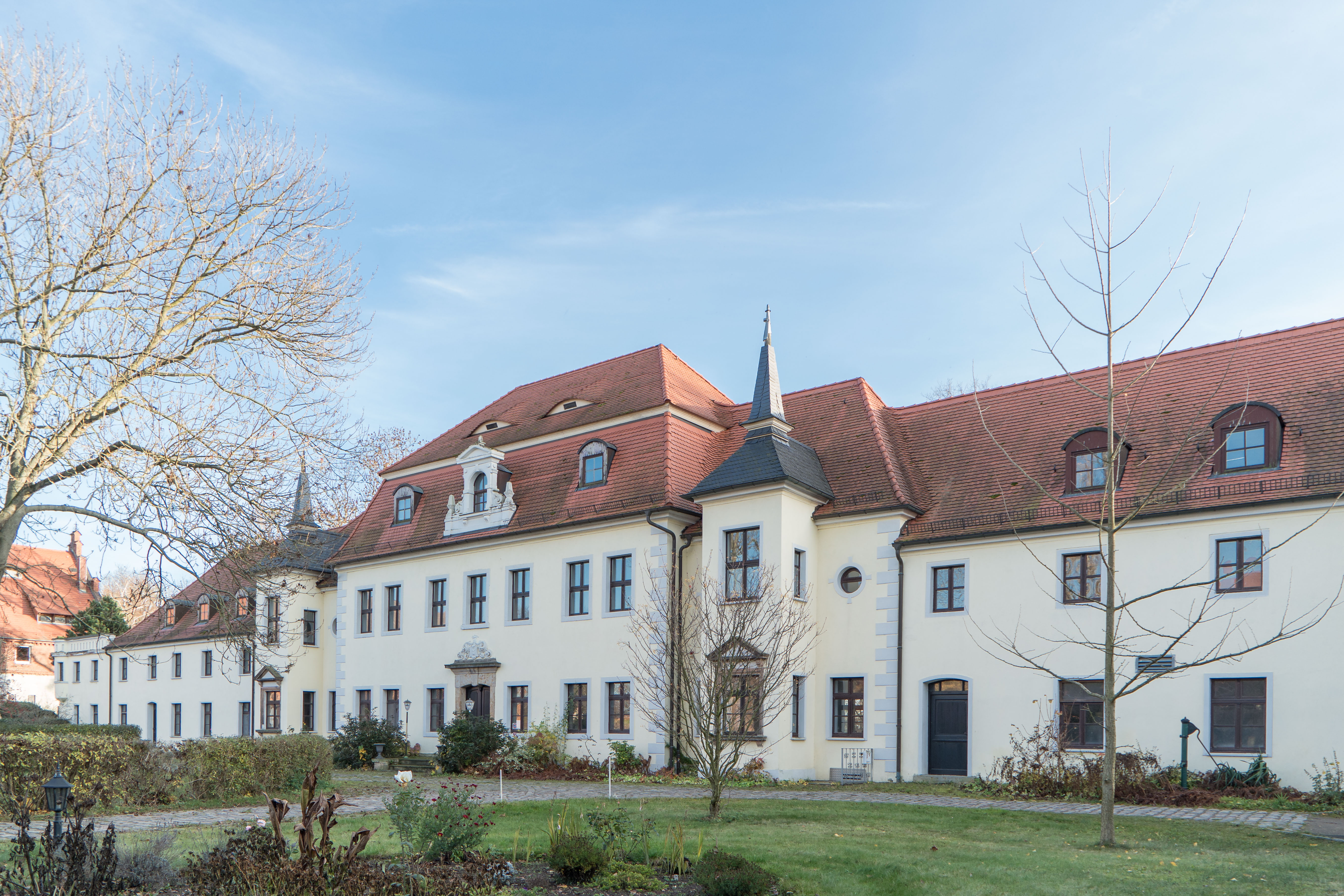 Schloss des Rittergut, Am Rittergut 15 in Arzberg OT Adelwitz